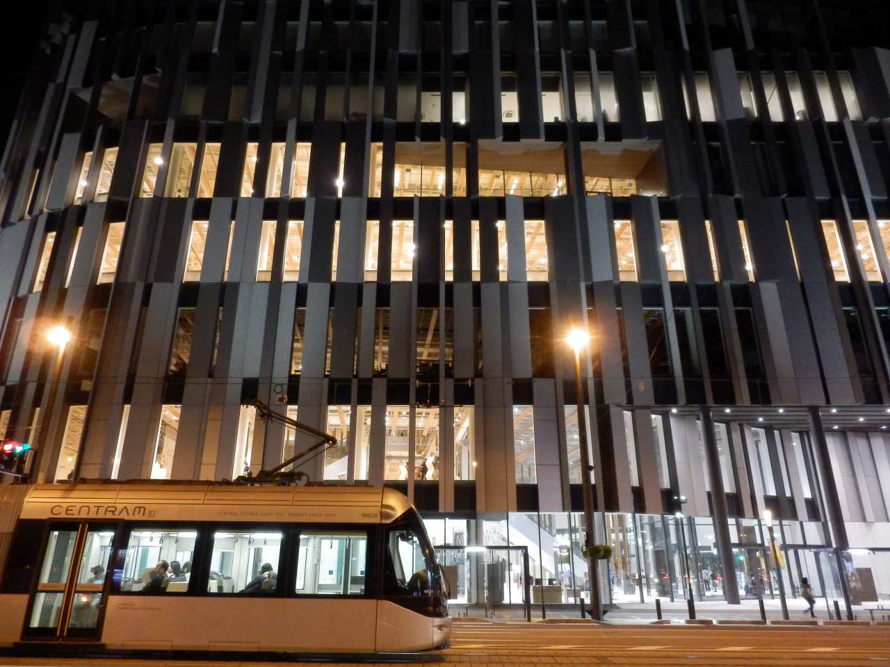 TOYAMAキラリ 夜景